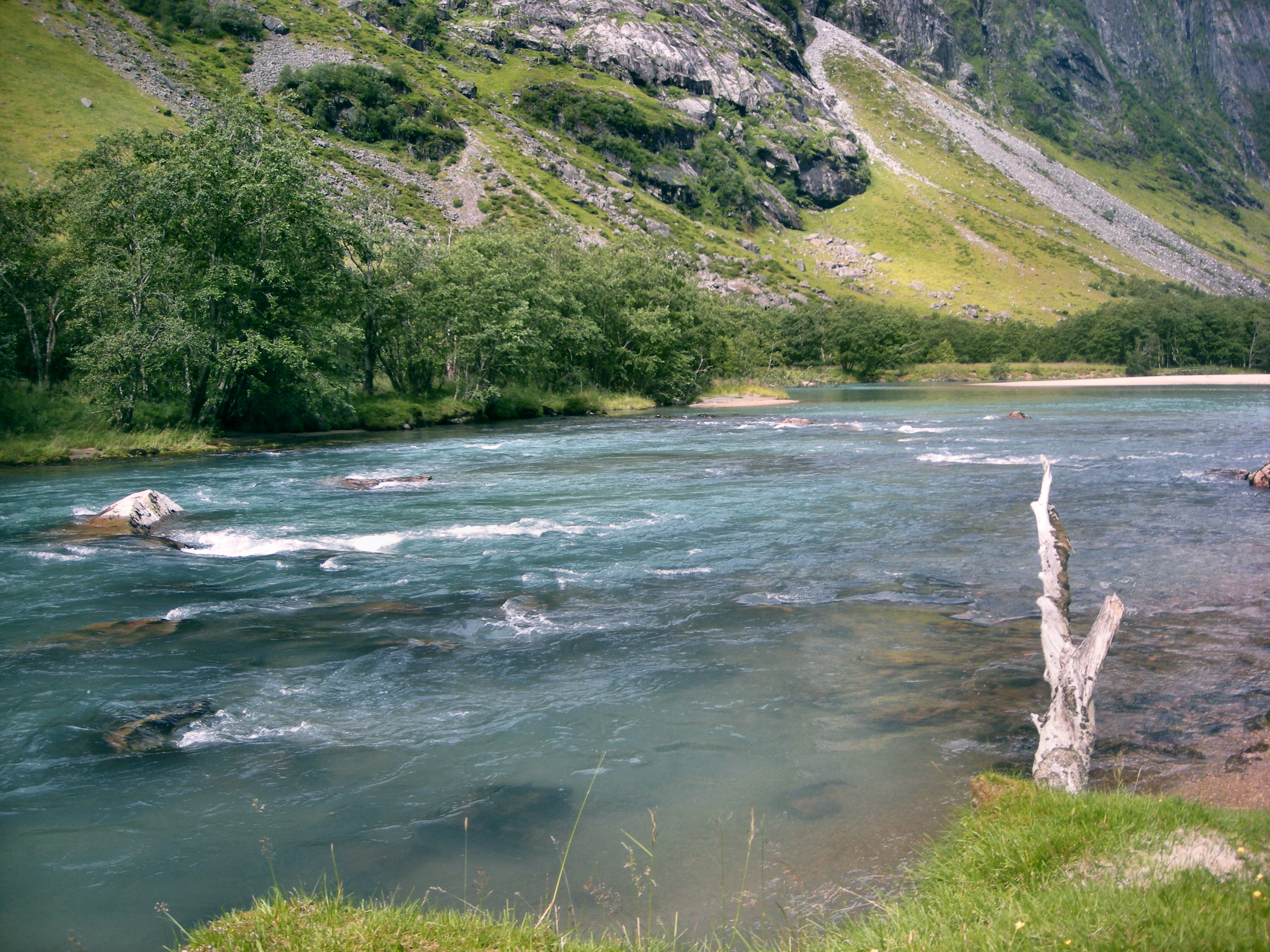 Våtedalen